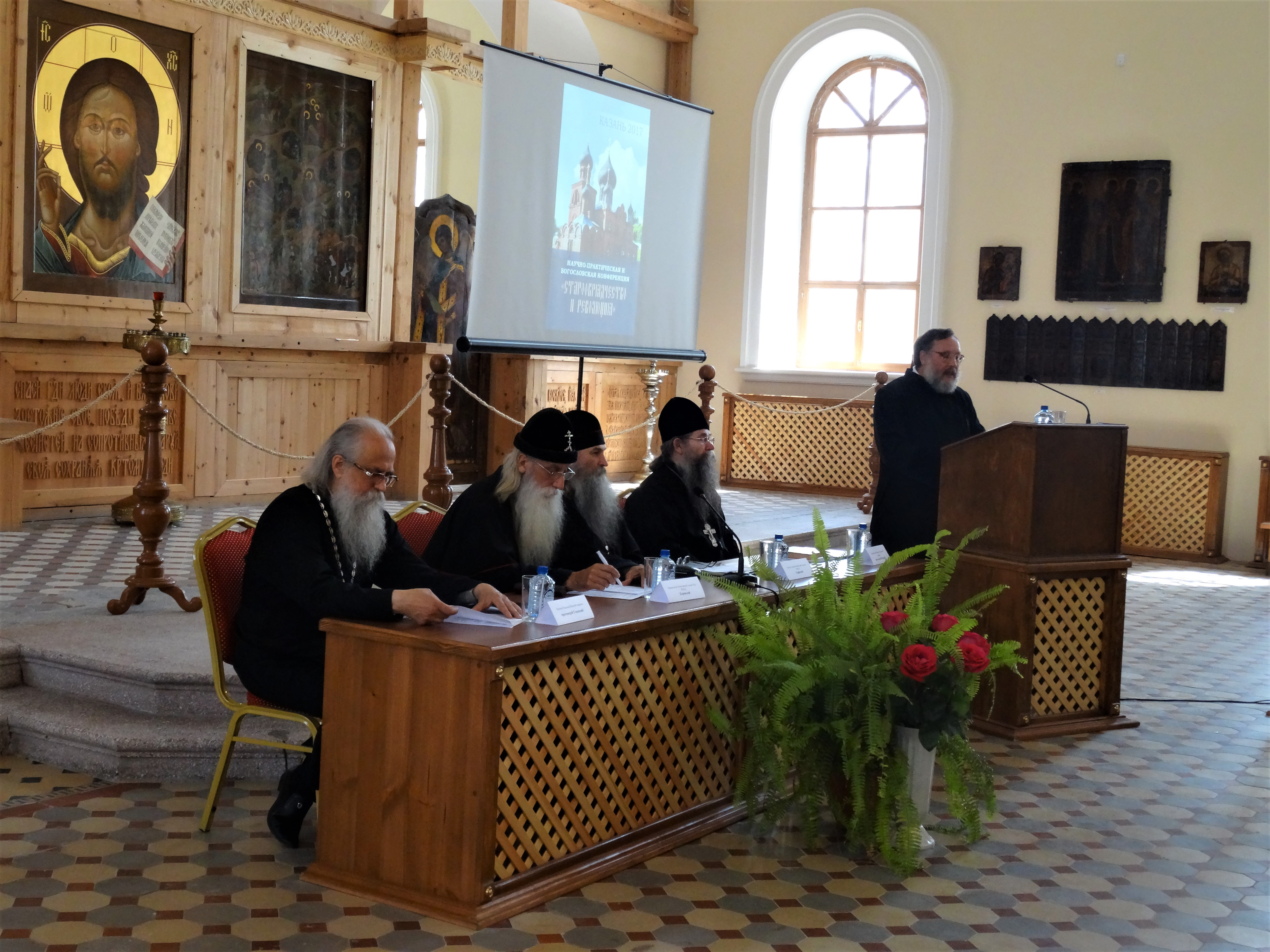 Выступление настоятеля Казанской общины христиан древлеправославно-кафолического вероисповедания и благочестия старо-поморского согласия А. Е. Хрычёва на торжественном открытии Всероссийской научно-практической конференции с международным участием «Старообрядчество и революция» (г. Казань, Казанский /Покровский/ собор Казанско-Вятской епархии РПСЦ, 24 июля 2017 г.).